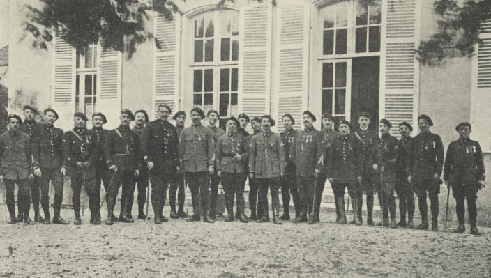 Les officiers du 28e bataillon de chasseurs alpins à la veille de l'attaque de La Malmaison (octobre 1917)